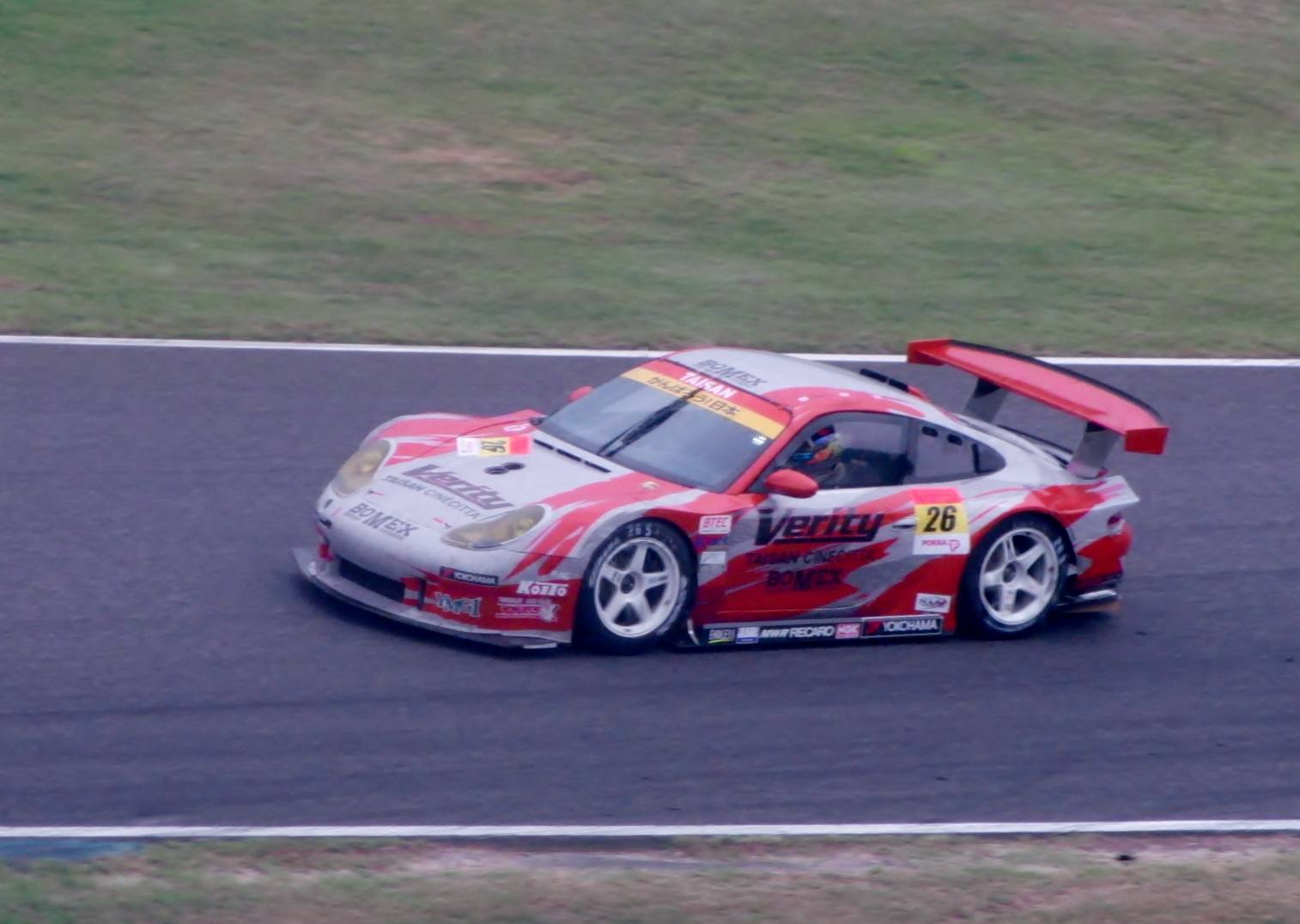 第40回インターナショナルポッカGTサマースペシャルに於けるVerity TAISAN Porscheを撮影。みんカラにもアップロードされている。